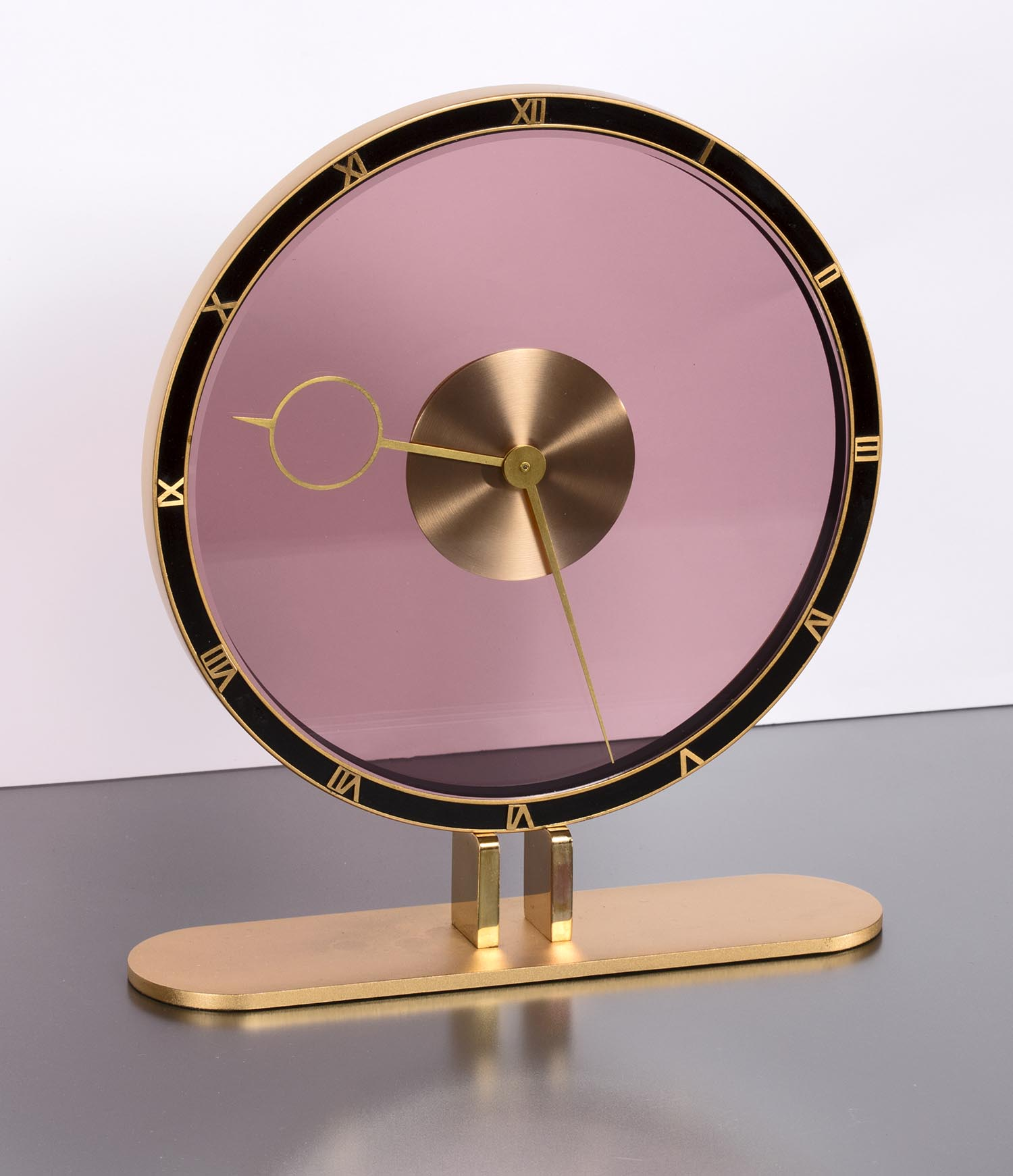 Der „vom Himmel gefallene Stern“ (Rudolf Bistrick) einer Stiluhr, Entwurf: Heinrich Möller, Kienzle, Schwenningen, ab 1935 (Deutsches Uhrenmuseum Furtwangen, Inv. 2014-022)